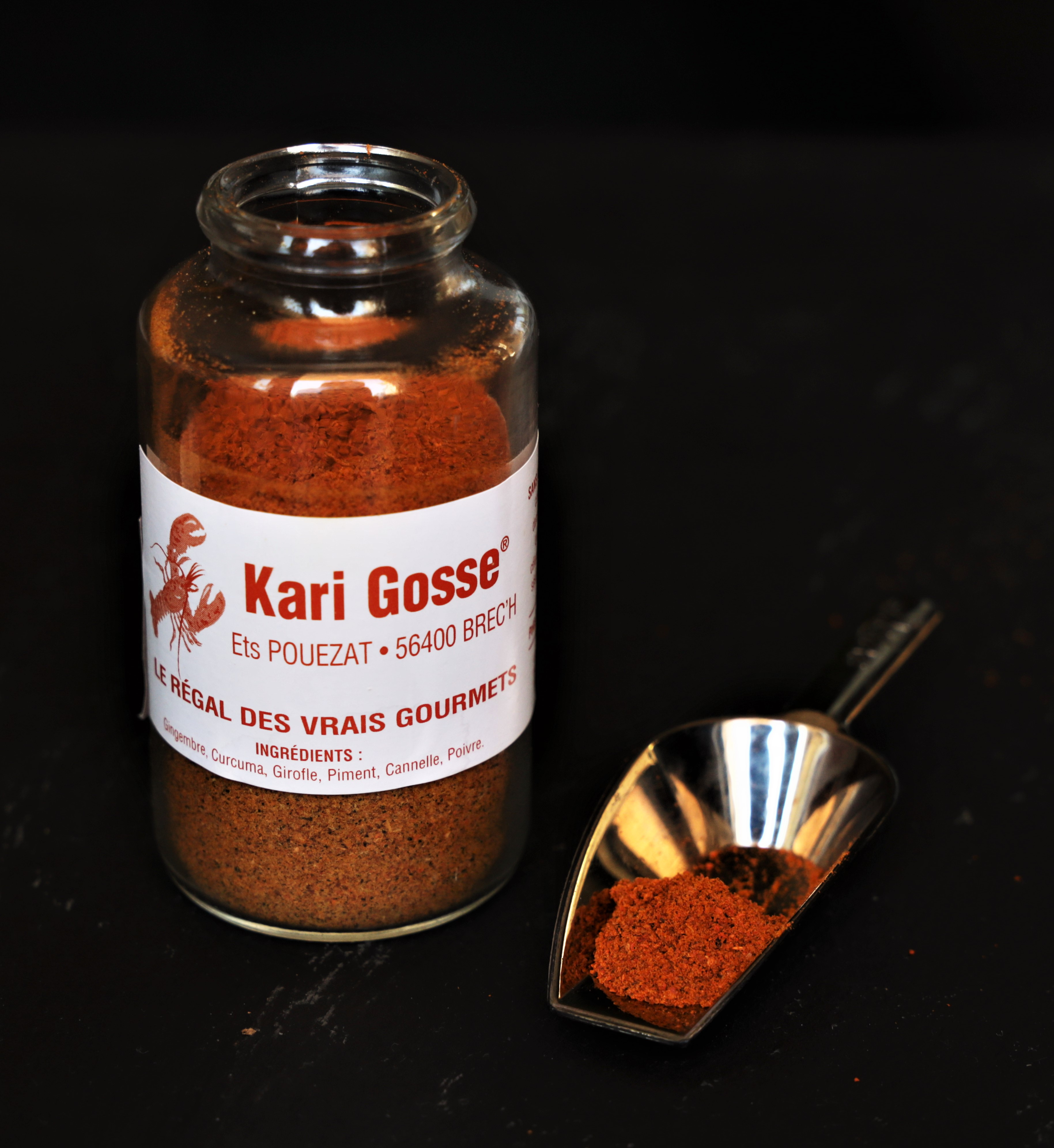 Kari Gosse